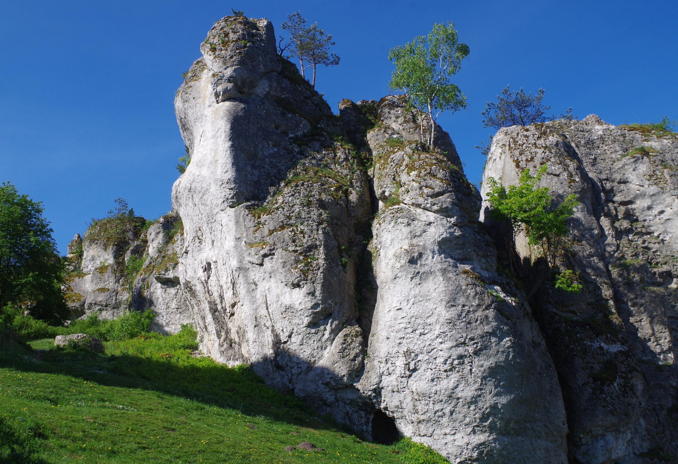 Grupa Turni Kukuczki w Mirowskich Skałach